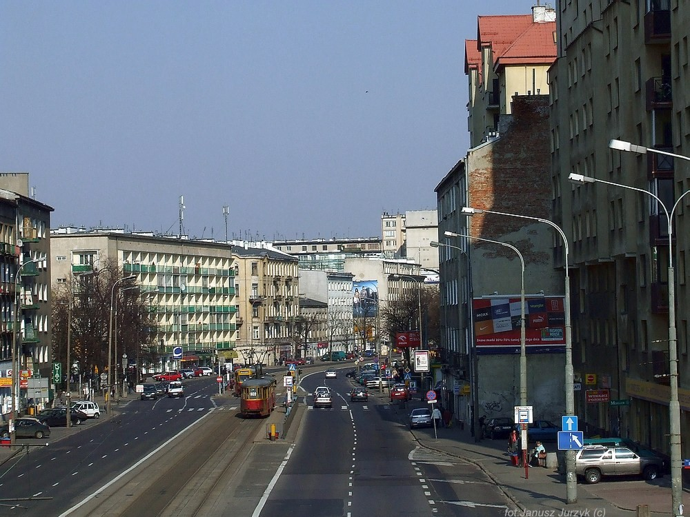 Warszawa ul.Wolska